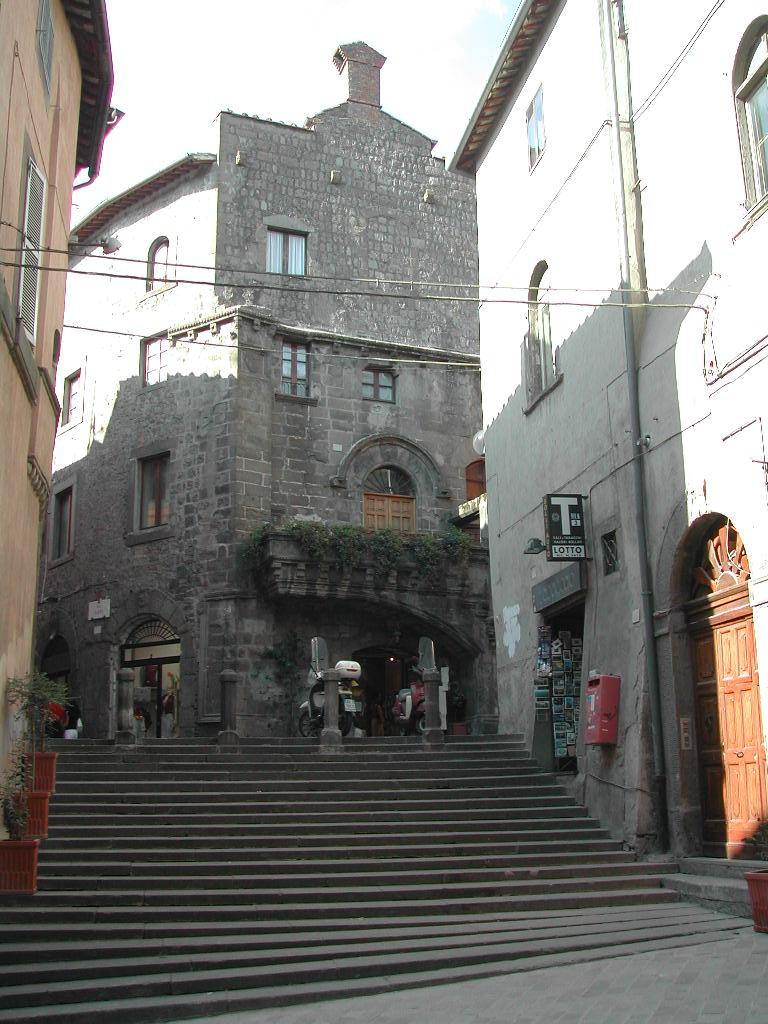 Viterbo, scalinata